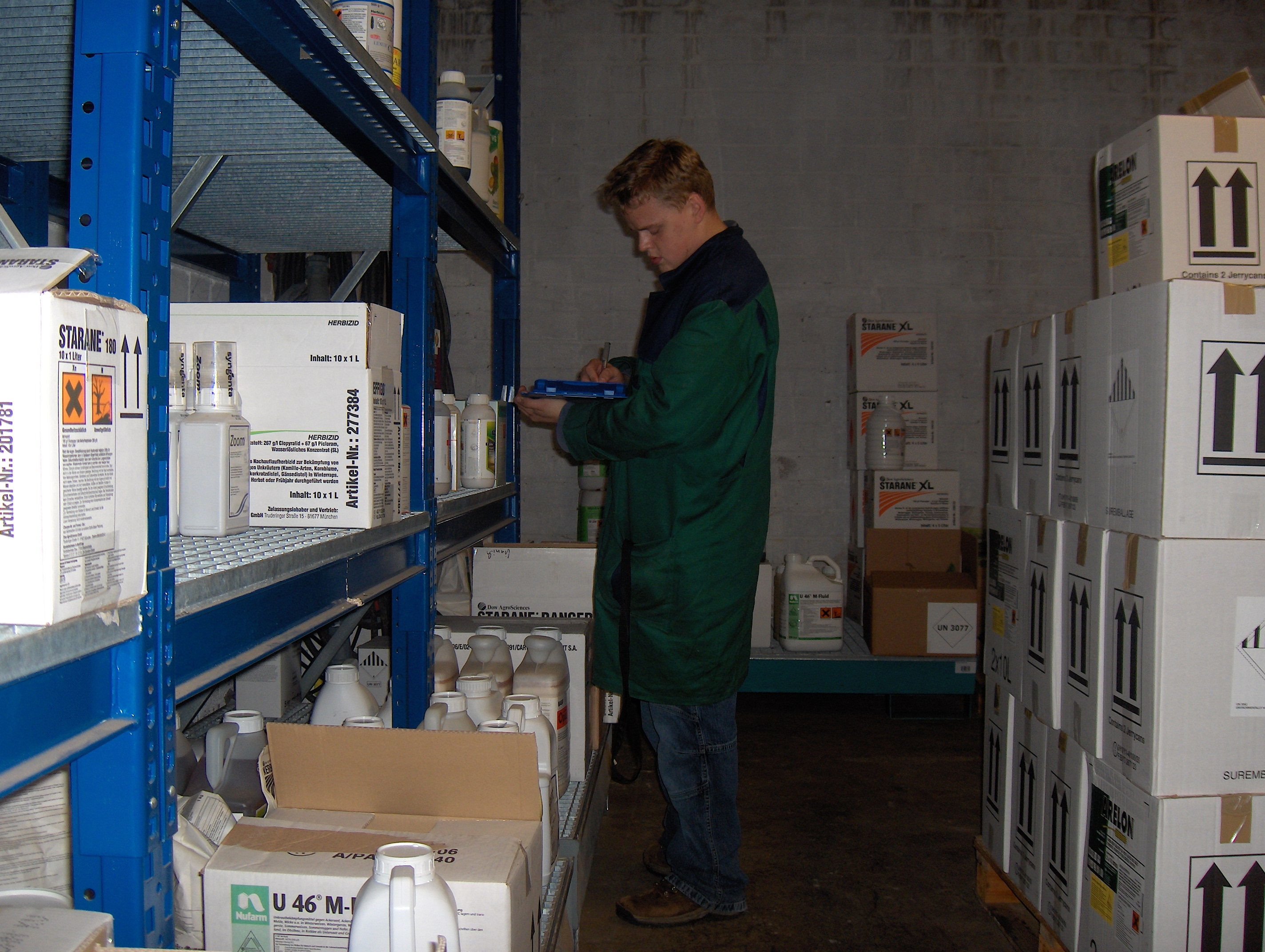 Ein Mitarbeiter beim Kommssionieren von Beizmitteln